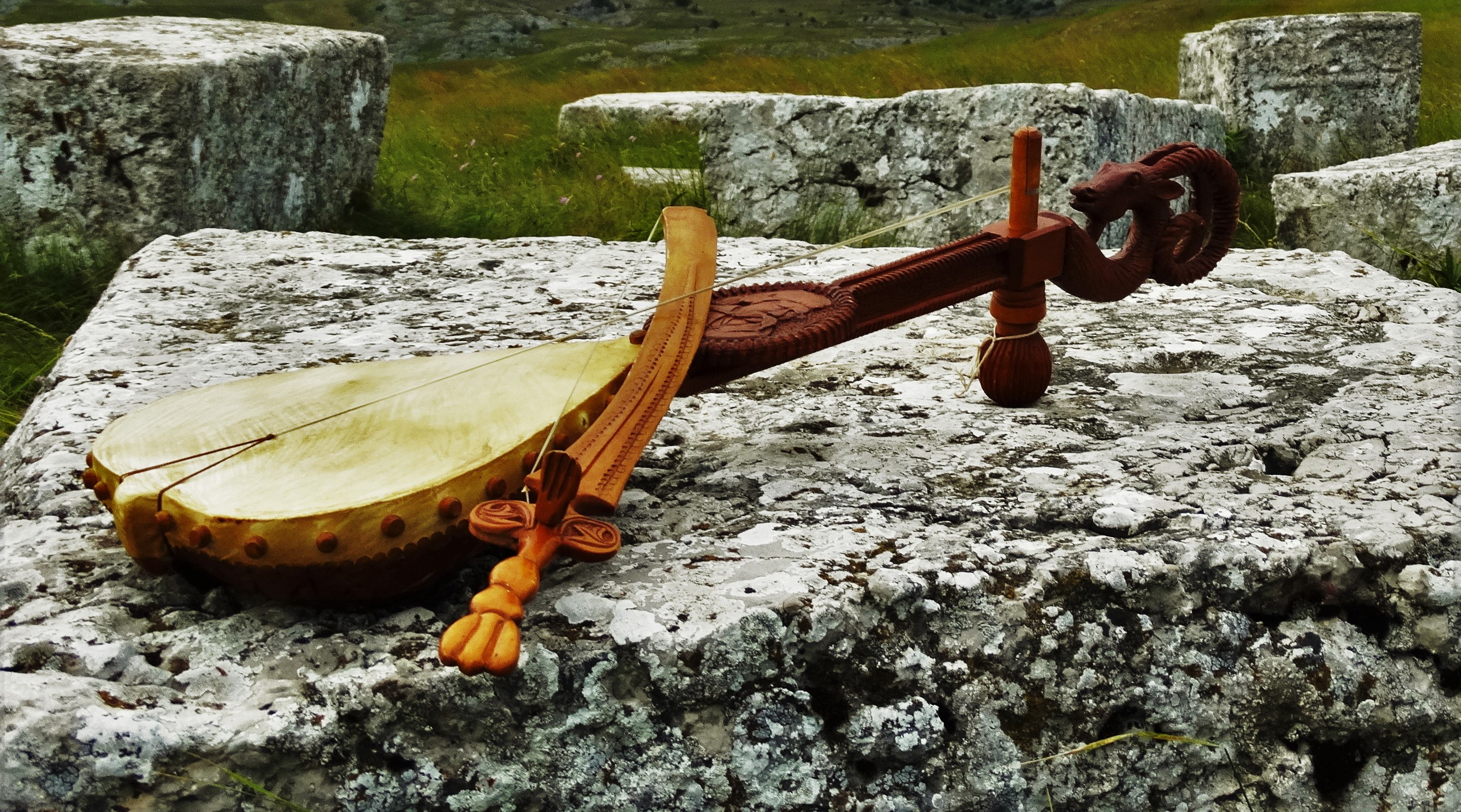 Područje opštine Nevesinje ima 117 nekropola sa ukupno 4.109 stećaka. Oblici stećaka u nevesinjskim nekropolama su ploče (39%), oblici sanduka (56%), sljemenici (4%) i krstače (0.8%). Pravljeni su od kamena krečnjaka boljeg kvaliteta, kojeg ima u izobilju u neposrednoj blizini. Prema očuvanim natpisima i karakteristikama, Nevesinjski stećci potiču iz perioda s kraja XIII do početka XVI vijeka. Mnogi se nalaze izmješani sa sadašnjim grobovima i spomenicima u njima. Najveća nekropola stećaka (452 stećka) u BiH nalazi se u selu Krekovi (zaseok Mijatovci, lokalitet “Kalufi“), 10 km udaljeno od centra grada. Sa ovoga lokaliteta 1960. godine kao izuzetne primjerke, dva stećka oblika sanduka, odvezena su u Vojni muzej na Kalemegdanu u Beograd gdje su i danas izloženi. NKD481